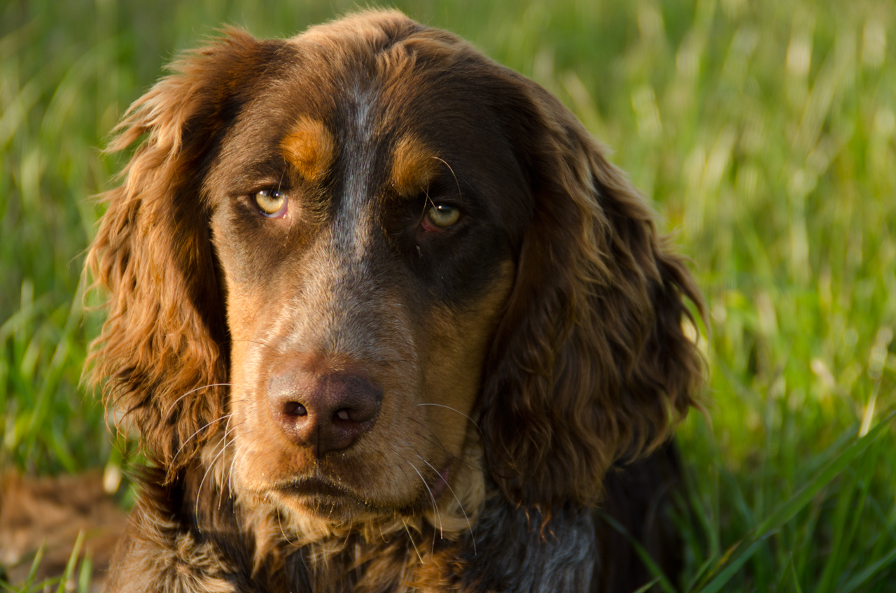 Notre épagneul picard, Gibbs des Chaumes de Thiérache à 6 mois